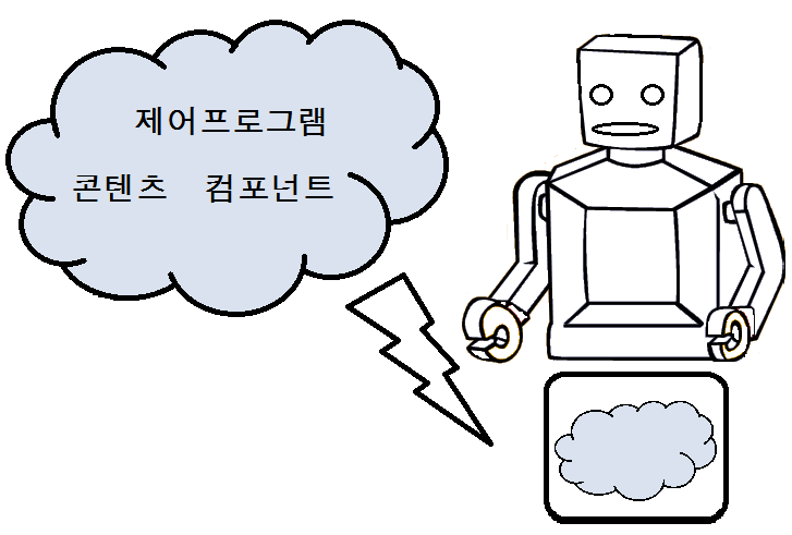 클라우드 로봇 유형2로 클라우드 컴퓨팅을 통하여 컴포넌트, 콘텐츠, 제어프로그램을 다운로드 하는 로봇